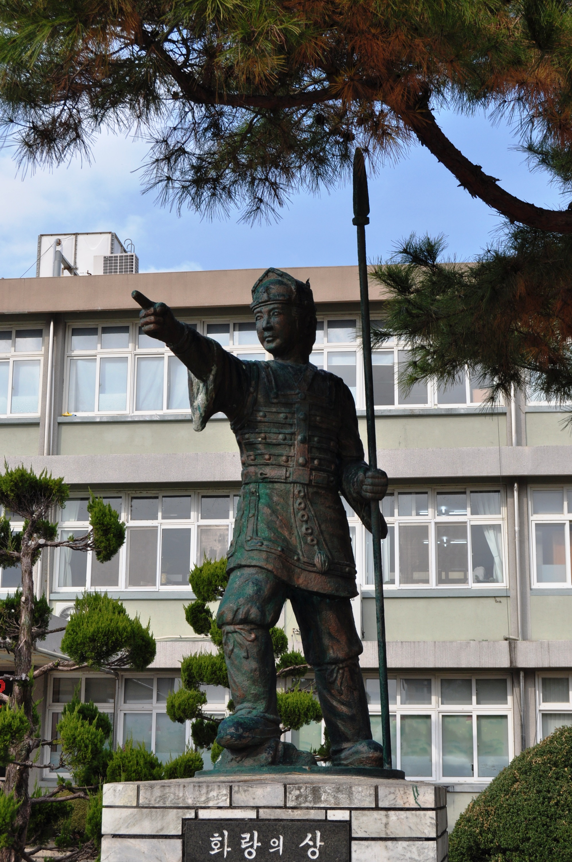 화랑의 상, 함양읍 함양중학교 교정 소재